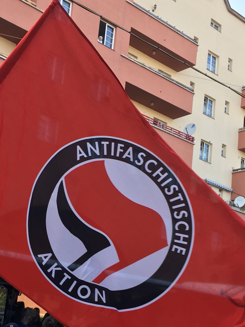 Flagge der Antifaschistische Aktion, dahinter der Karl-Marx-Hof